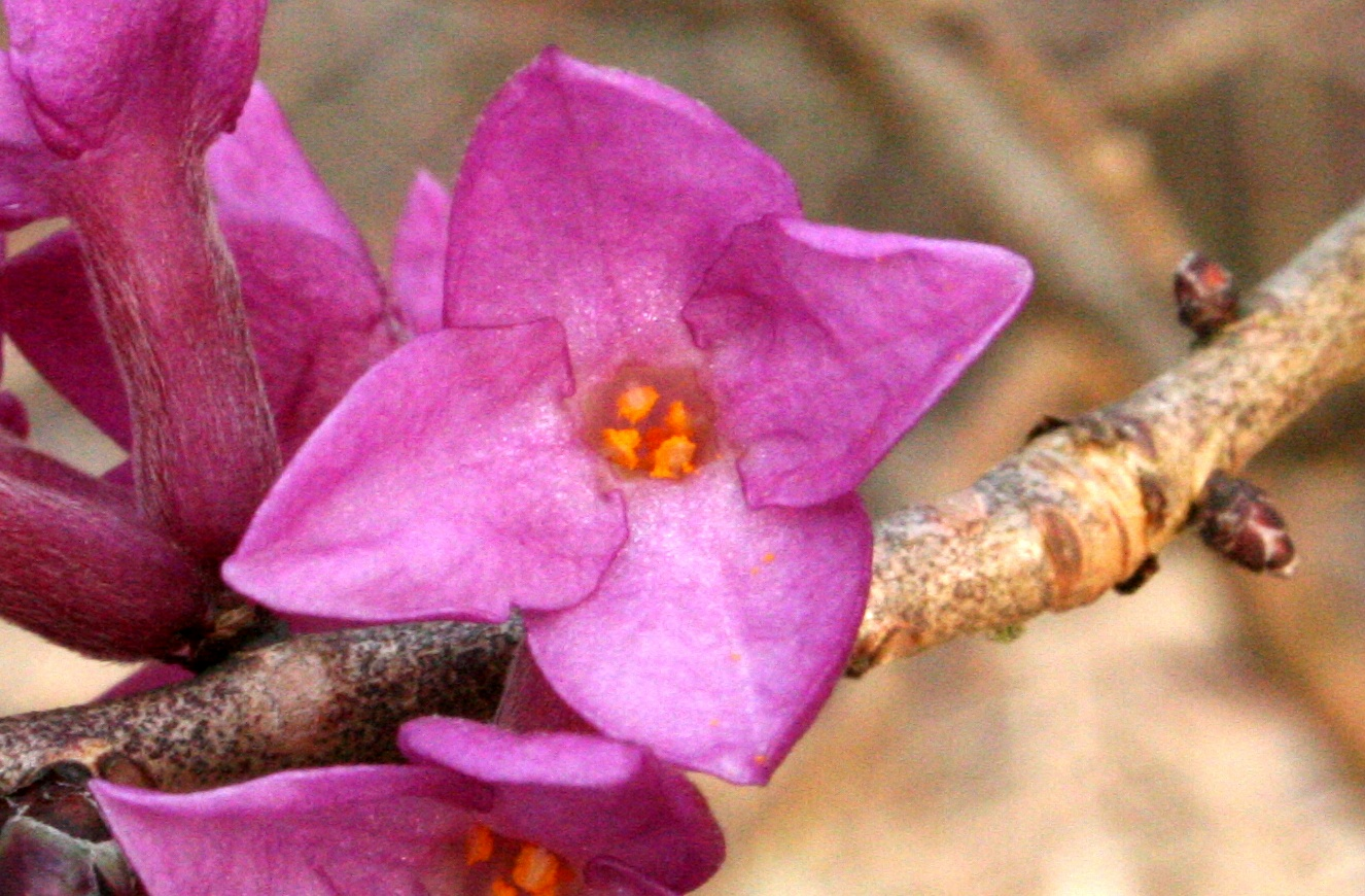 Daphne_mezereum (Dafne mezereo) Località : Noal, Trichiana (BL), 514 m s.l.m.